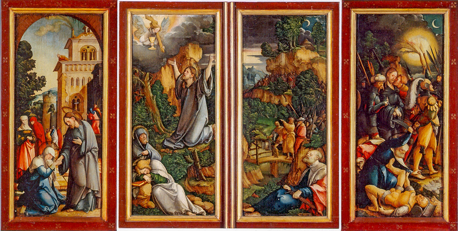 Der Wildensteiner Altar in geschlossenem Zustand